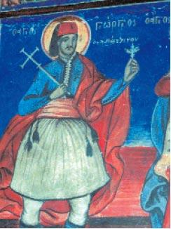 Фреска от църквата "Света Петка" в село Бериславци, Егейска Македония, Гърция.